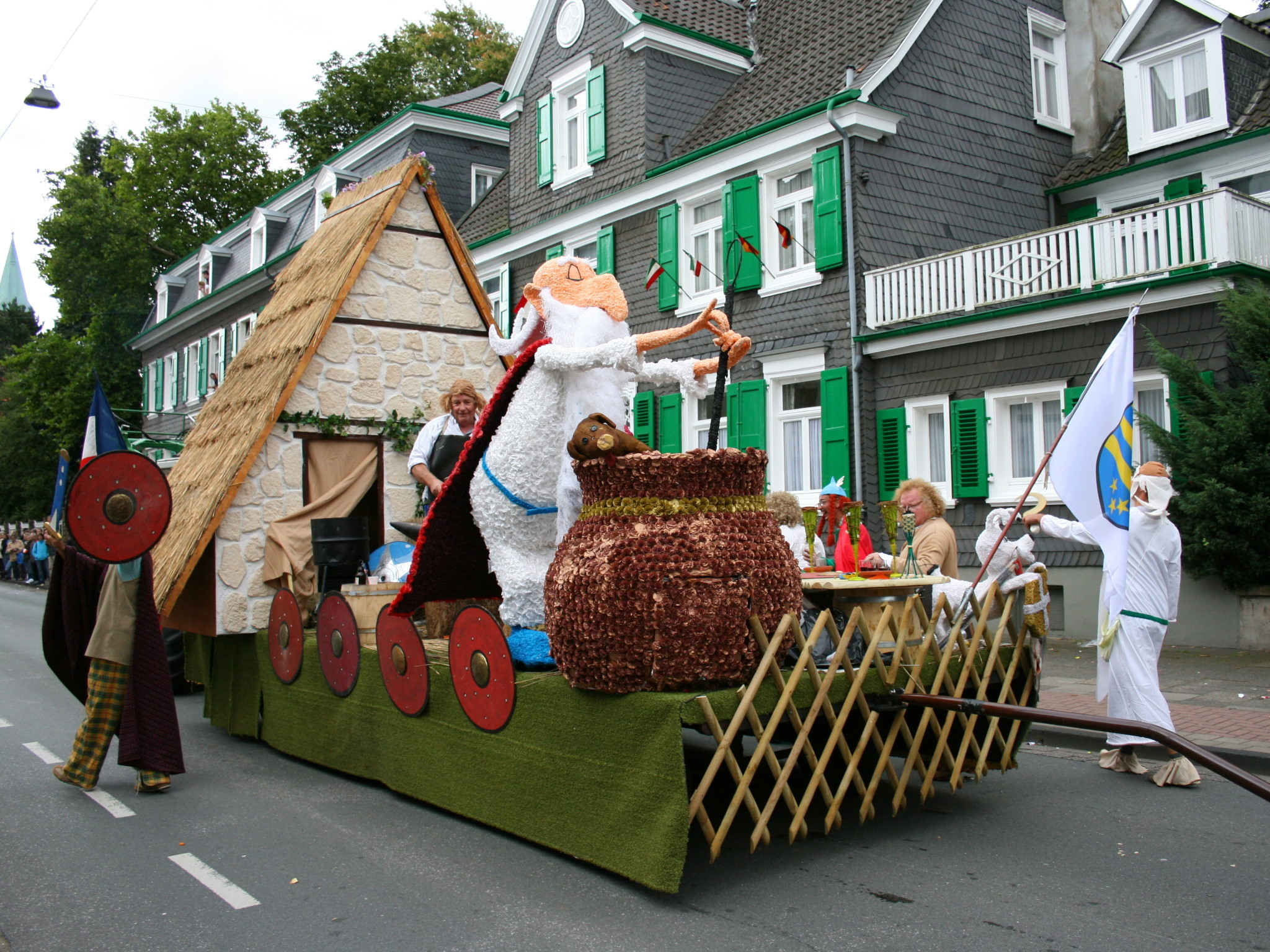 Schwelmer Heimatfest am 07. Sep. 2008